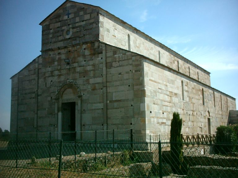 Photo by LAT and co. 08/2006.